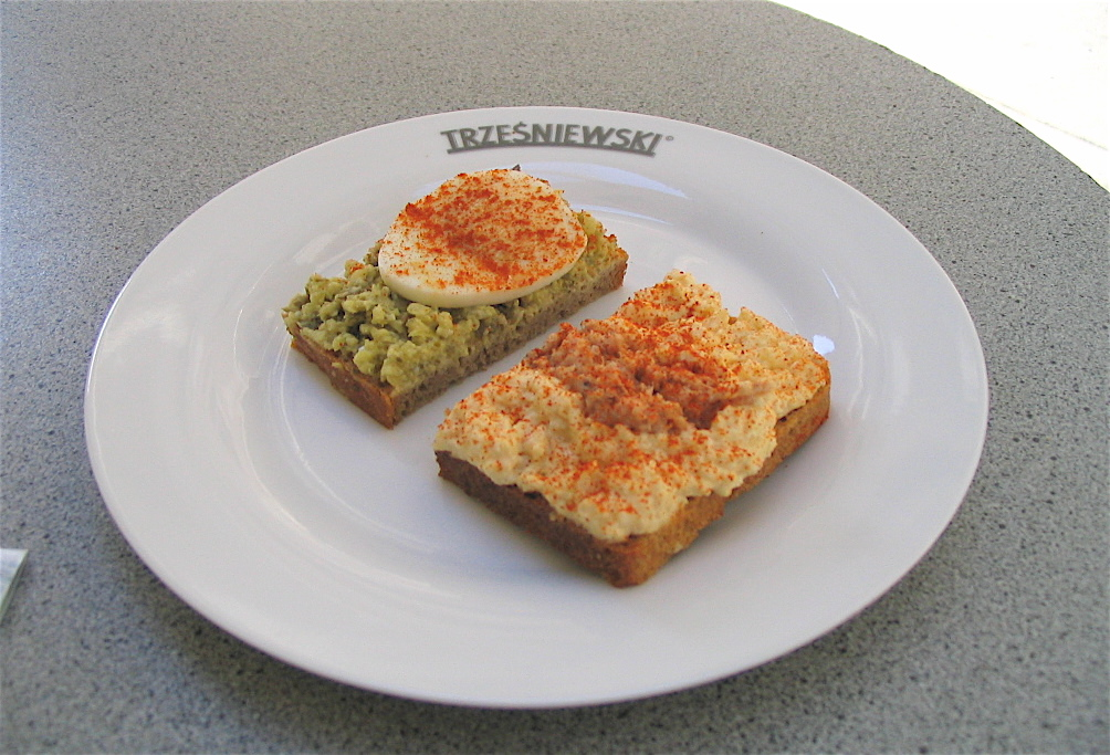 Innere Stadt, Wien.